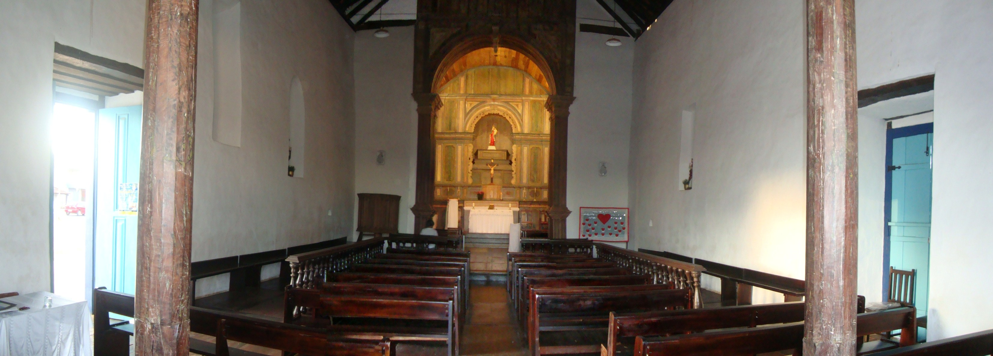 Igreja do rosário em Luziânia GO